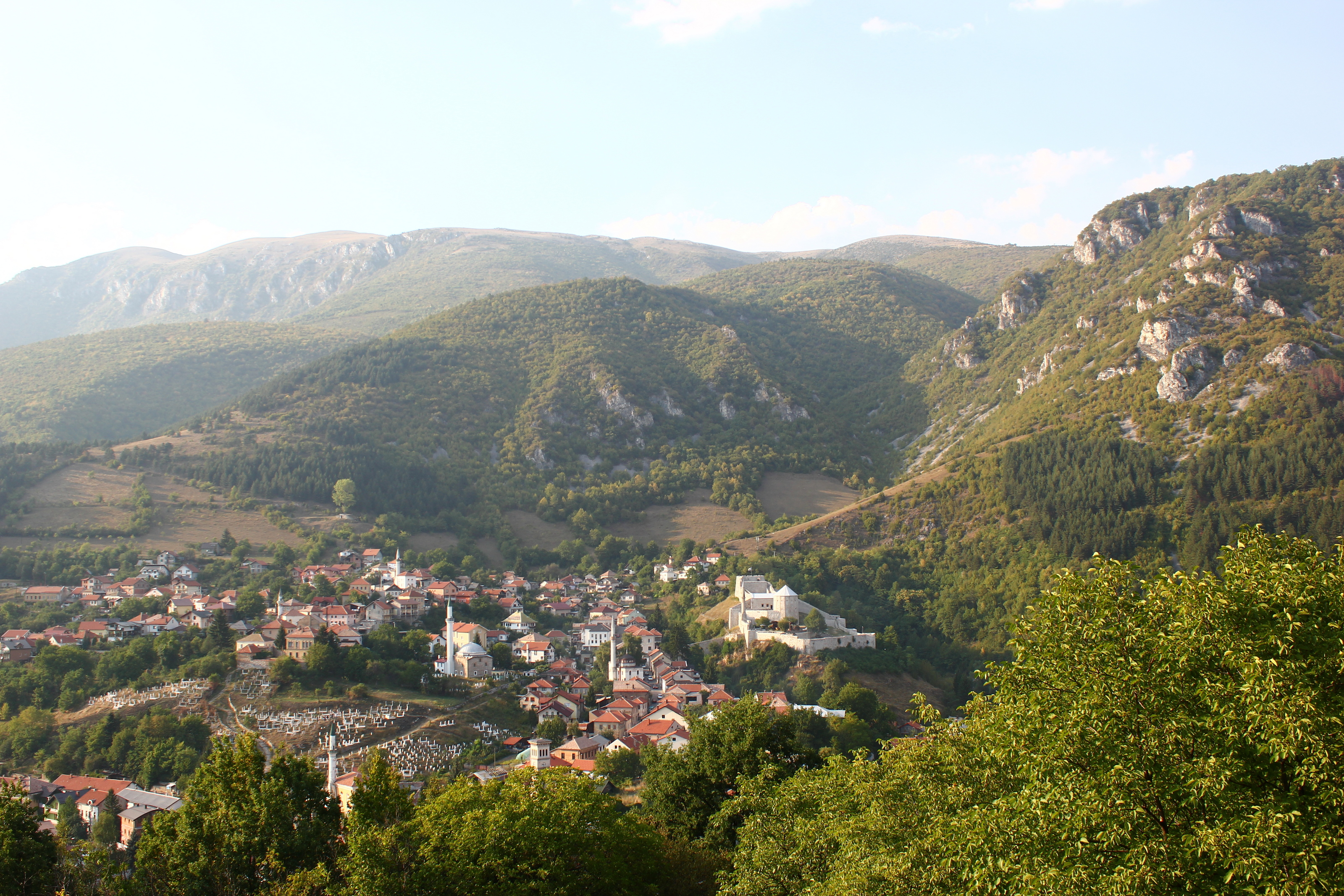 Blick über die Altstadt von Travnik und die umliegenden Berge.